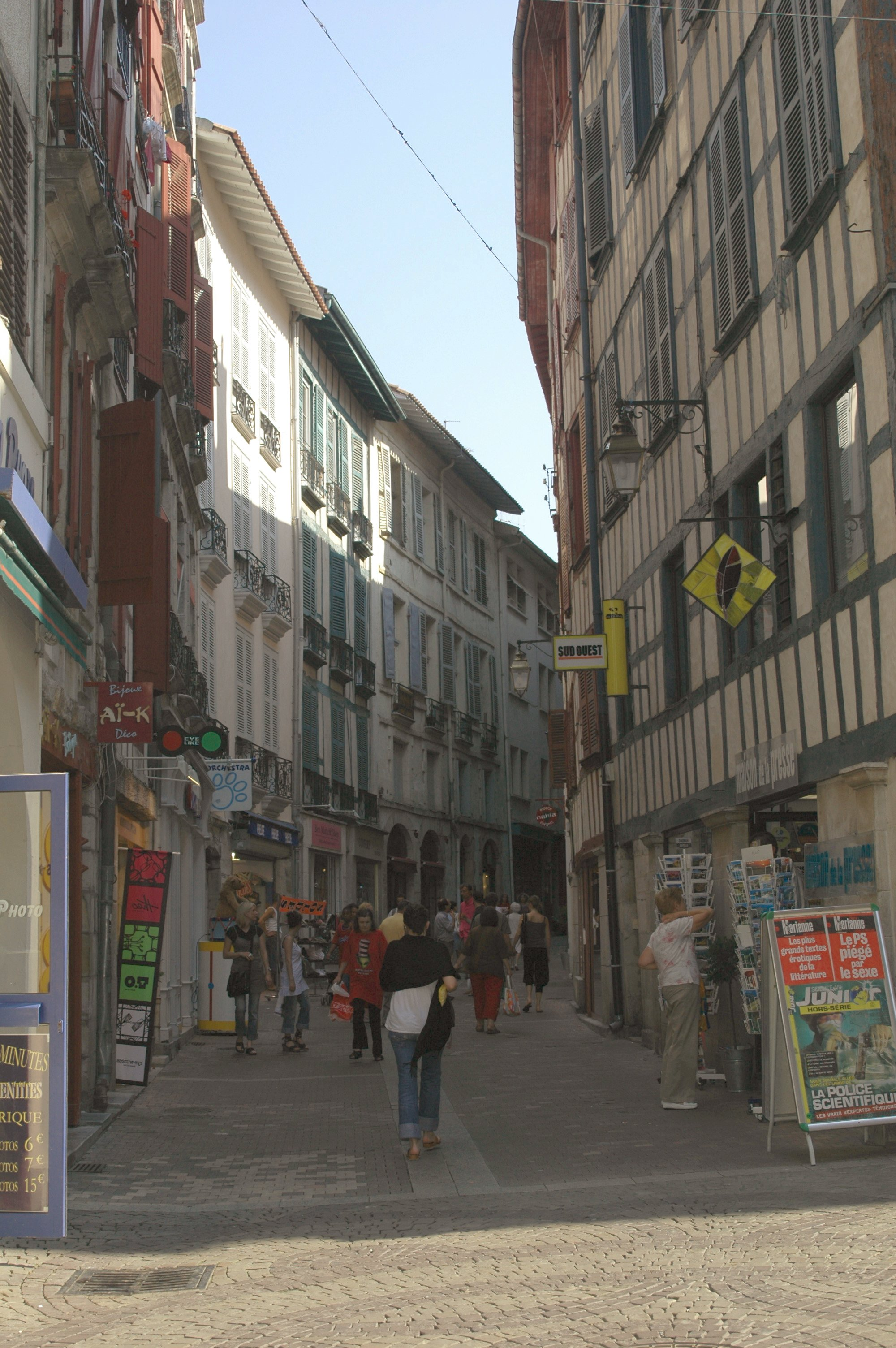 Bayonne, rue de la Salie. Photo prise le 10/07/06 par Harrieta171